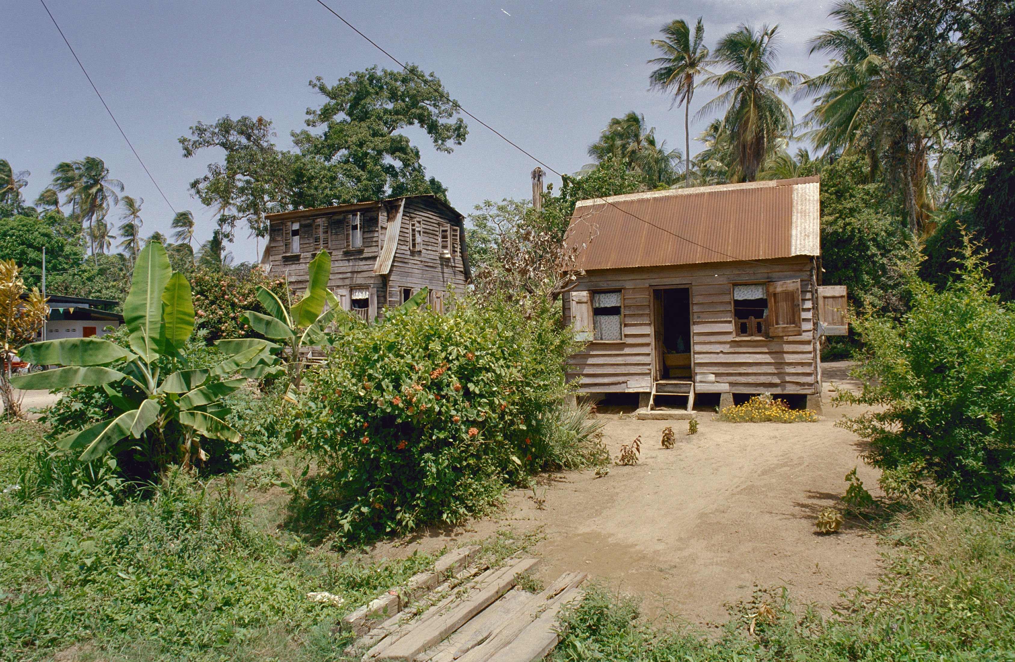 Koloniale geschiedenis: Vooraanzicht gevels (opmerking: Suriname Reis Loek Tangel)